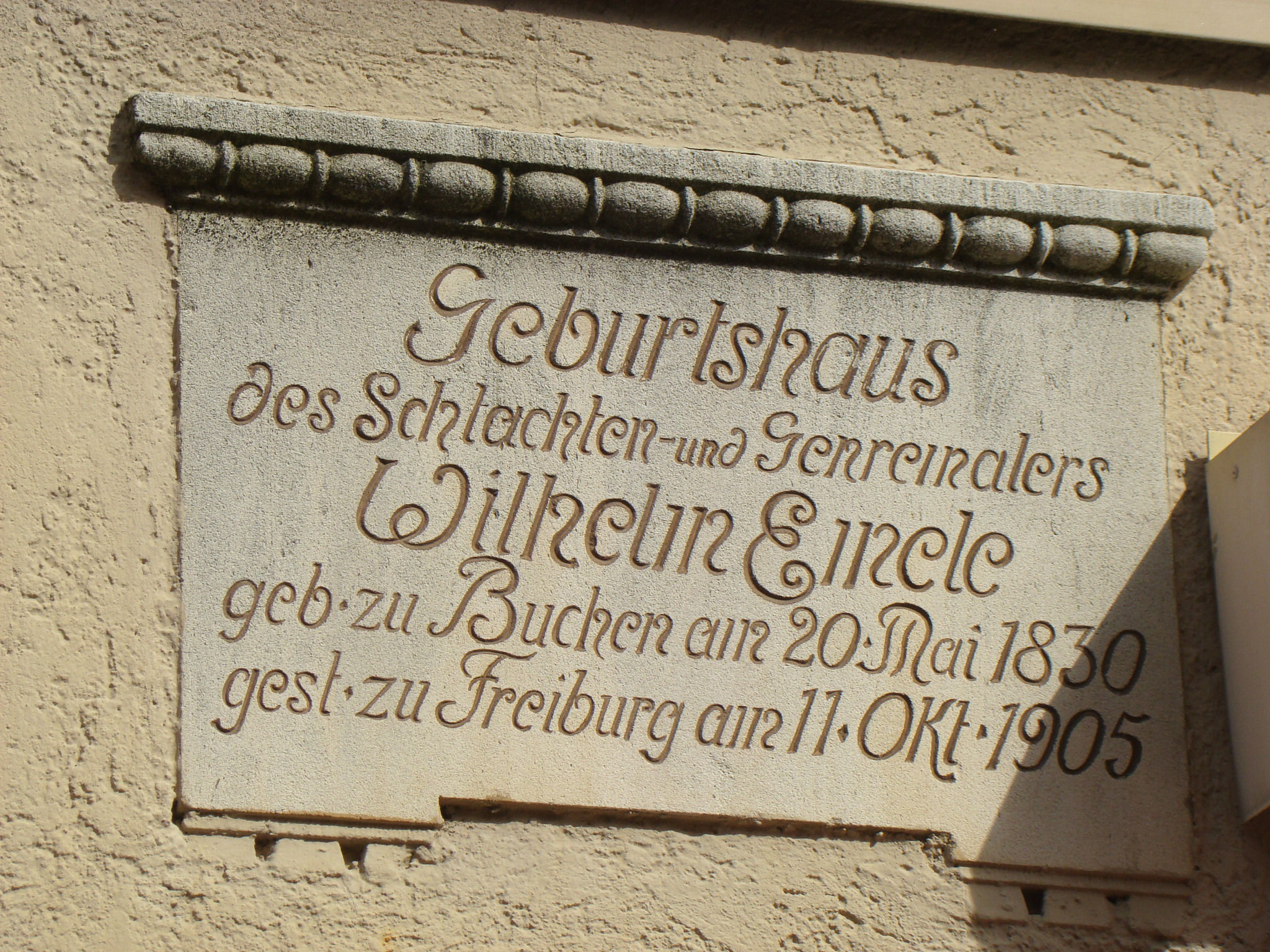 Buchen (Odenwald), Gedenktafel am Emele-Geburtshaus